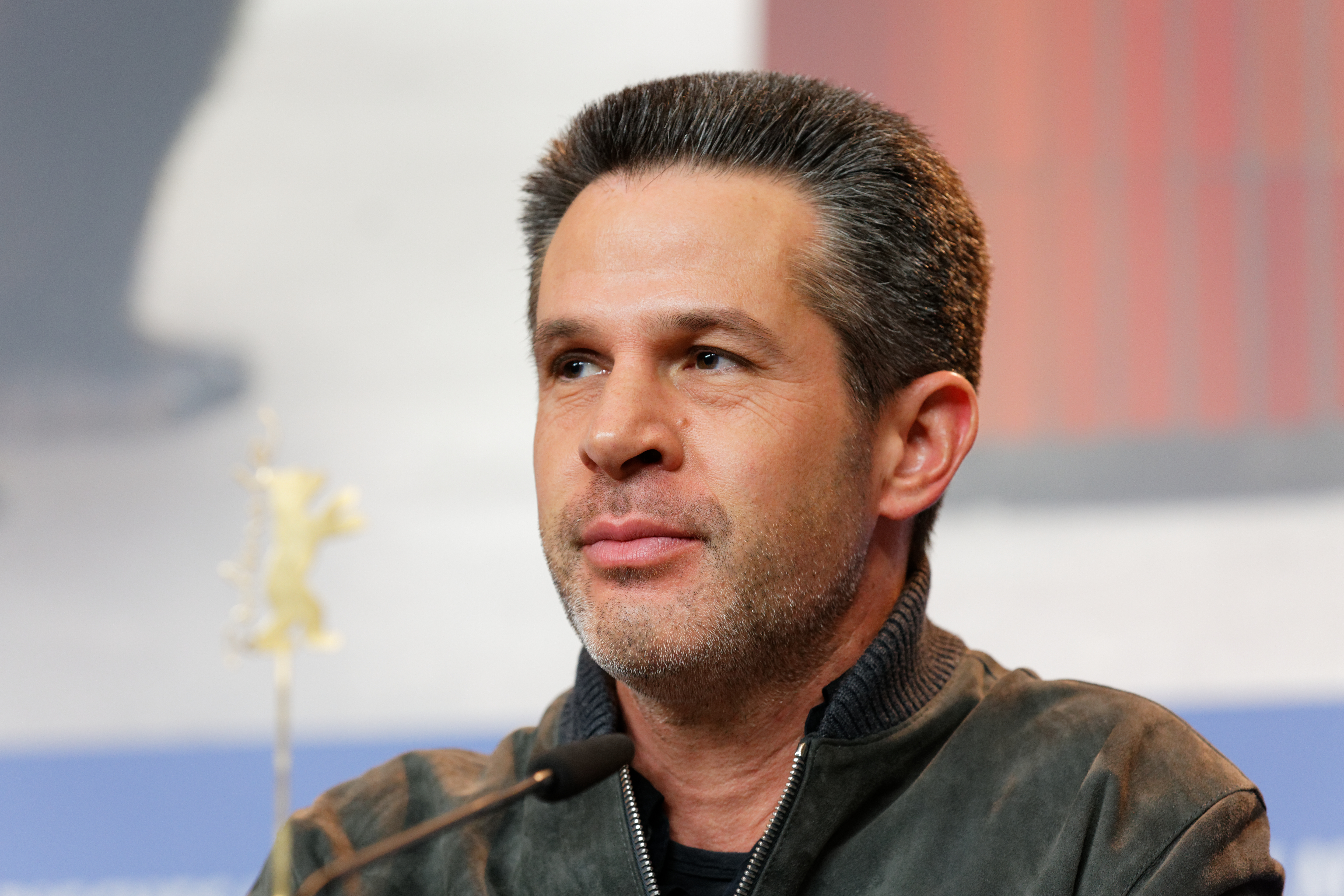 Simon Kinberg bei der Pressekonferenz zu Logan bei der Berlinale 2017